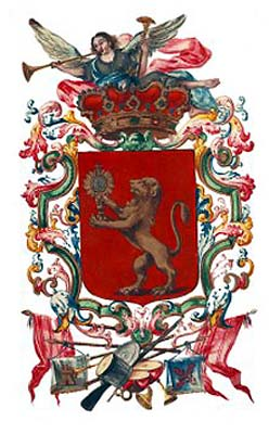 Escudo de Yepes